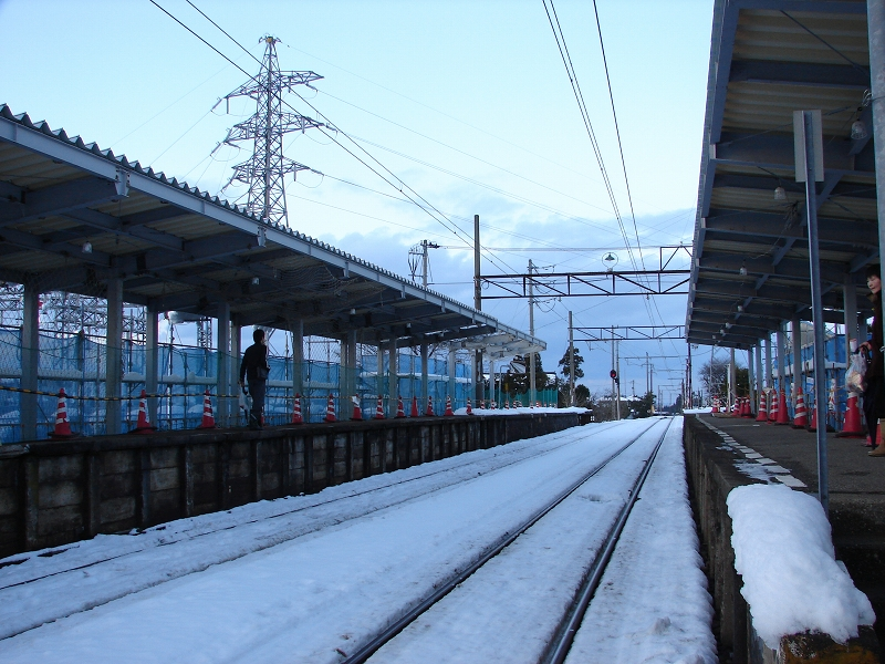 五百石駅のホームの写真です。 2008年1月2日 撮影者：Series207